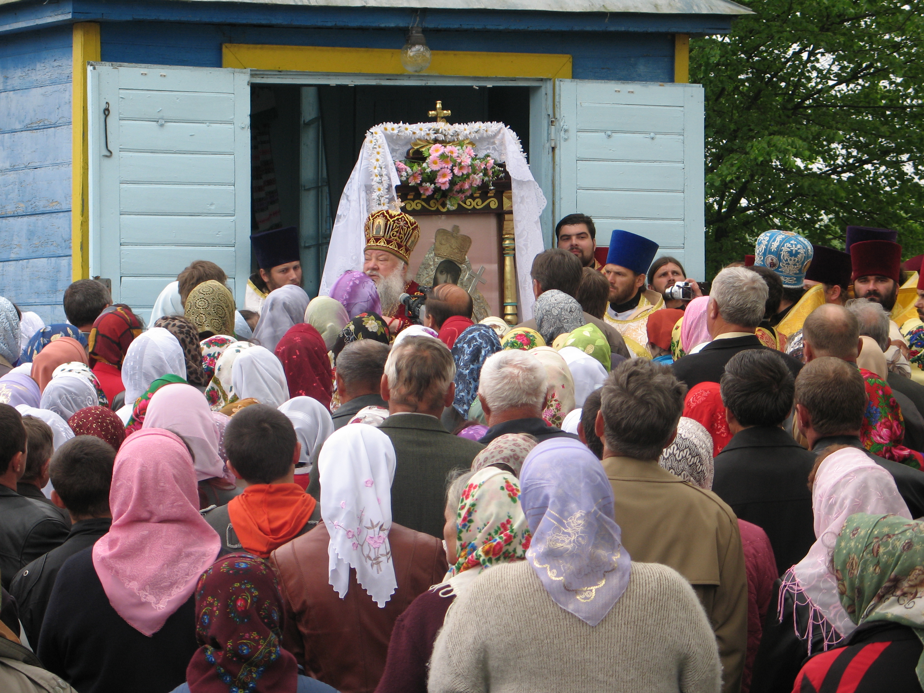 Владика Ніфонт виголошує проповідь перед прочанами в Бучині